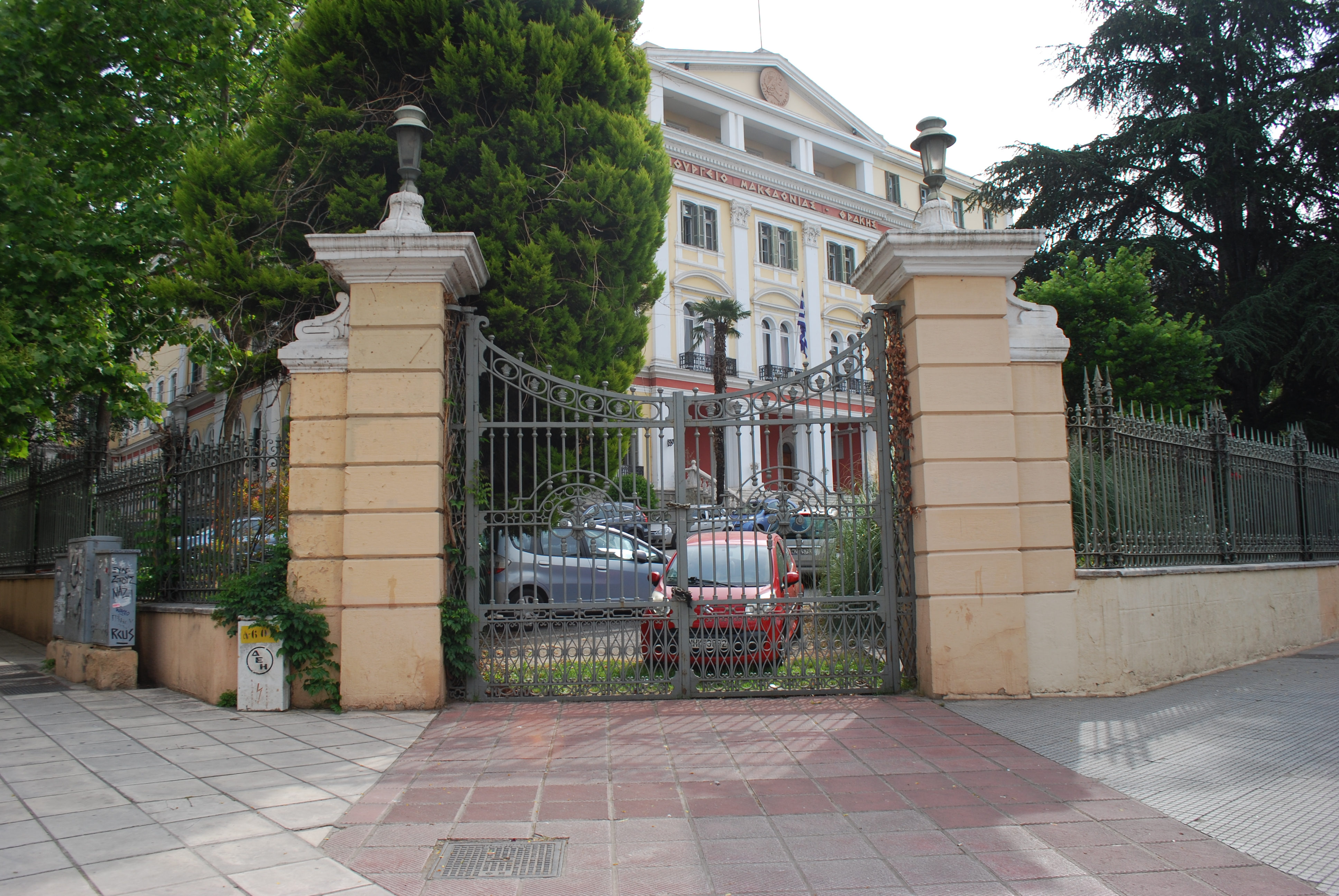 Vue de la rue saint-Demetreios (Odos Agiou Dimitriou) à Thessalonique en Grèce.